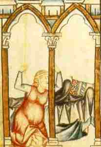 Medieval depiction of "Beata Ozana, virgen, de Mantua"